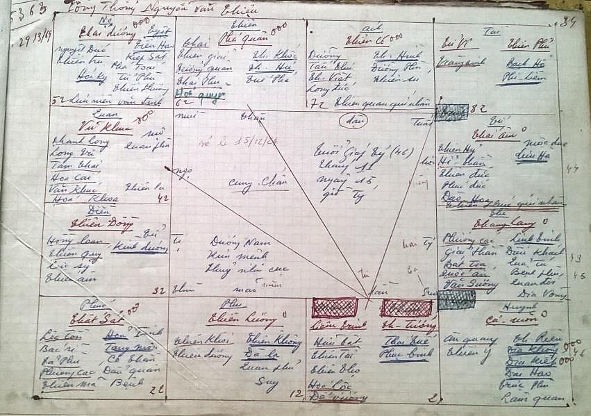 N V Thiệu2